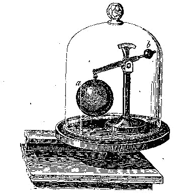 Principe de fonctionnement du baroscope